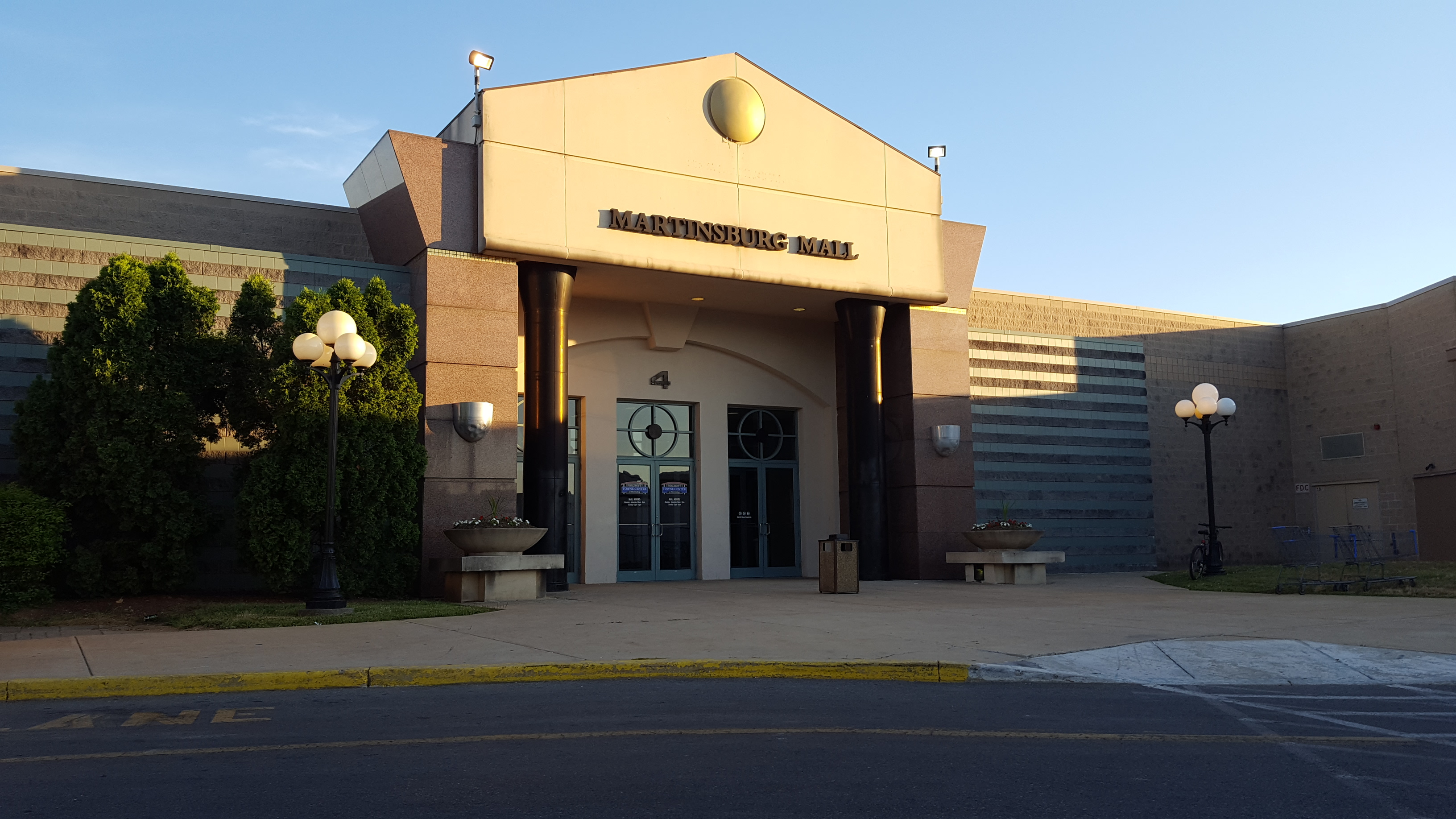 Martinsburg Mall Martinsburg, WV June 2016